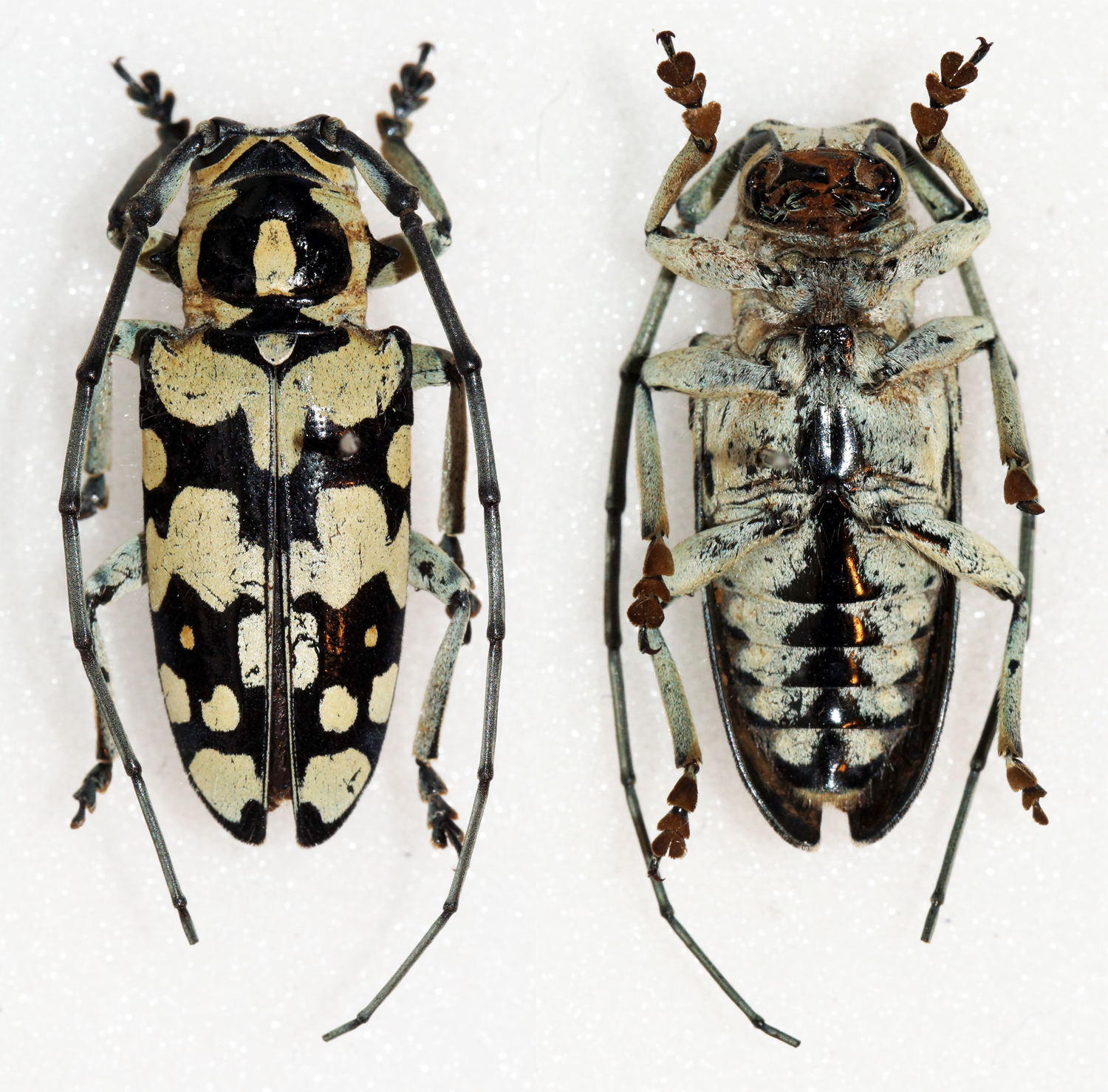 Breuning,1935 Sex: Male Data: 08-2014 - Serenje - Zambia Size: 21mm